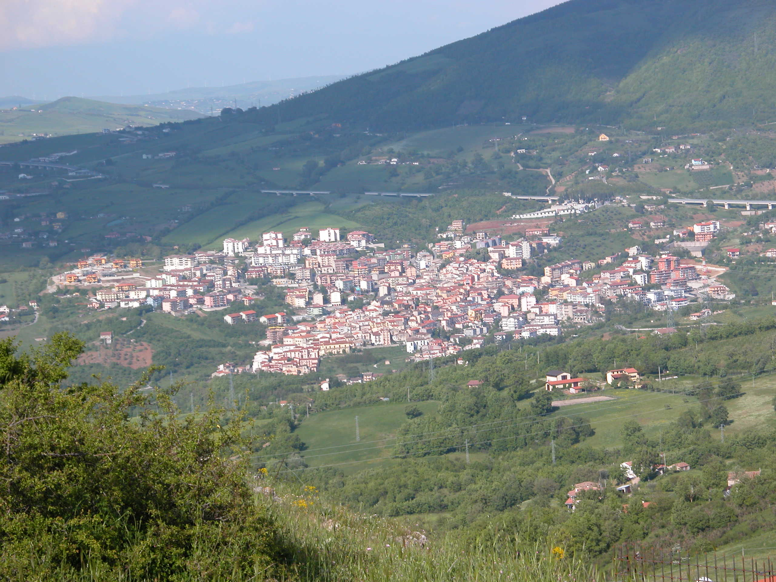 Vista dalla Torre di Satriano dell'abitato di Tito